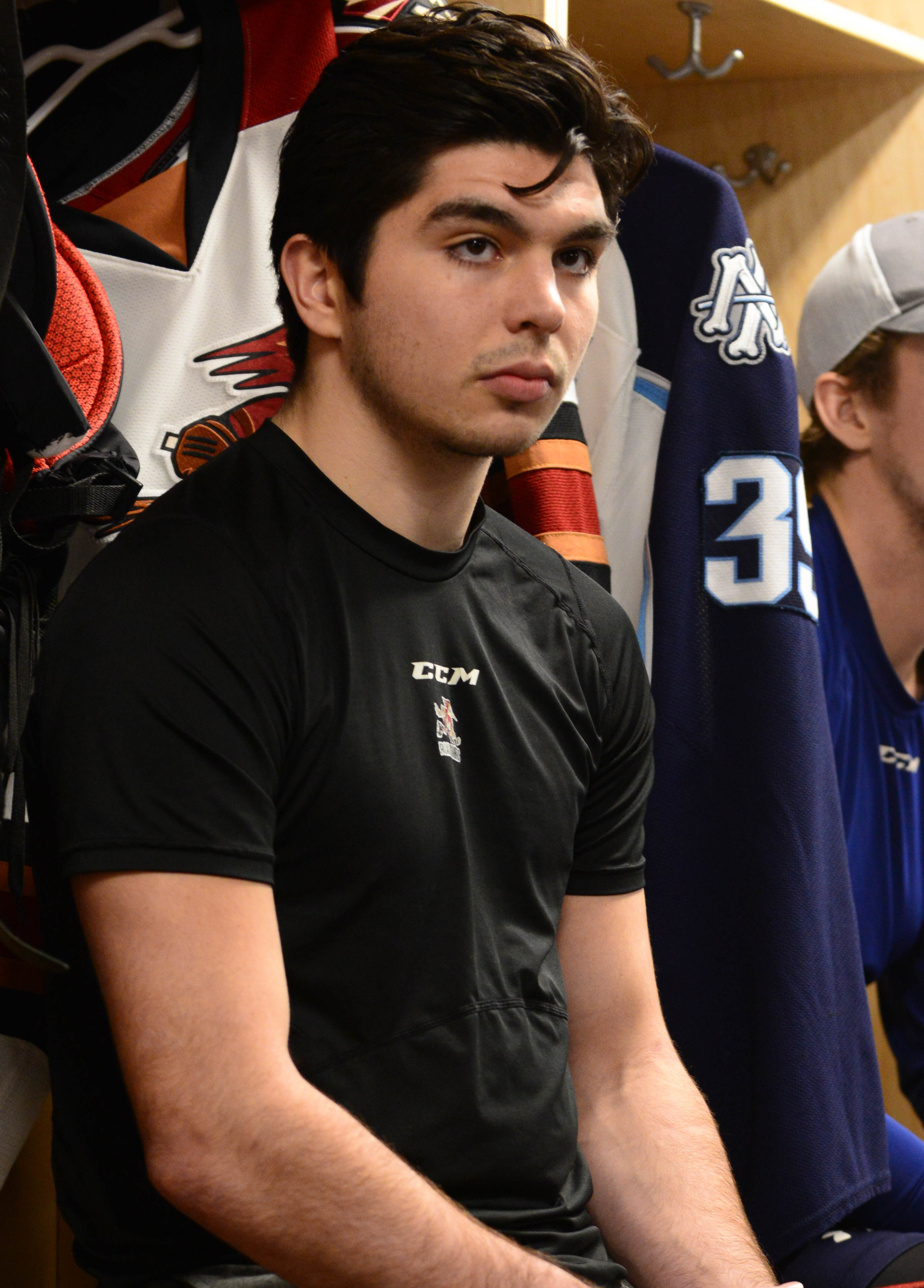 (Bryan Peck / AHL)